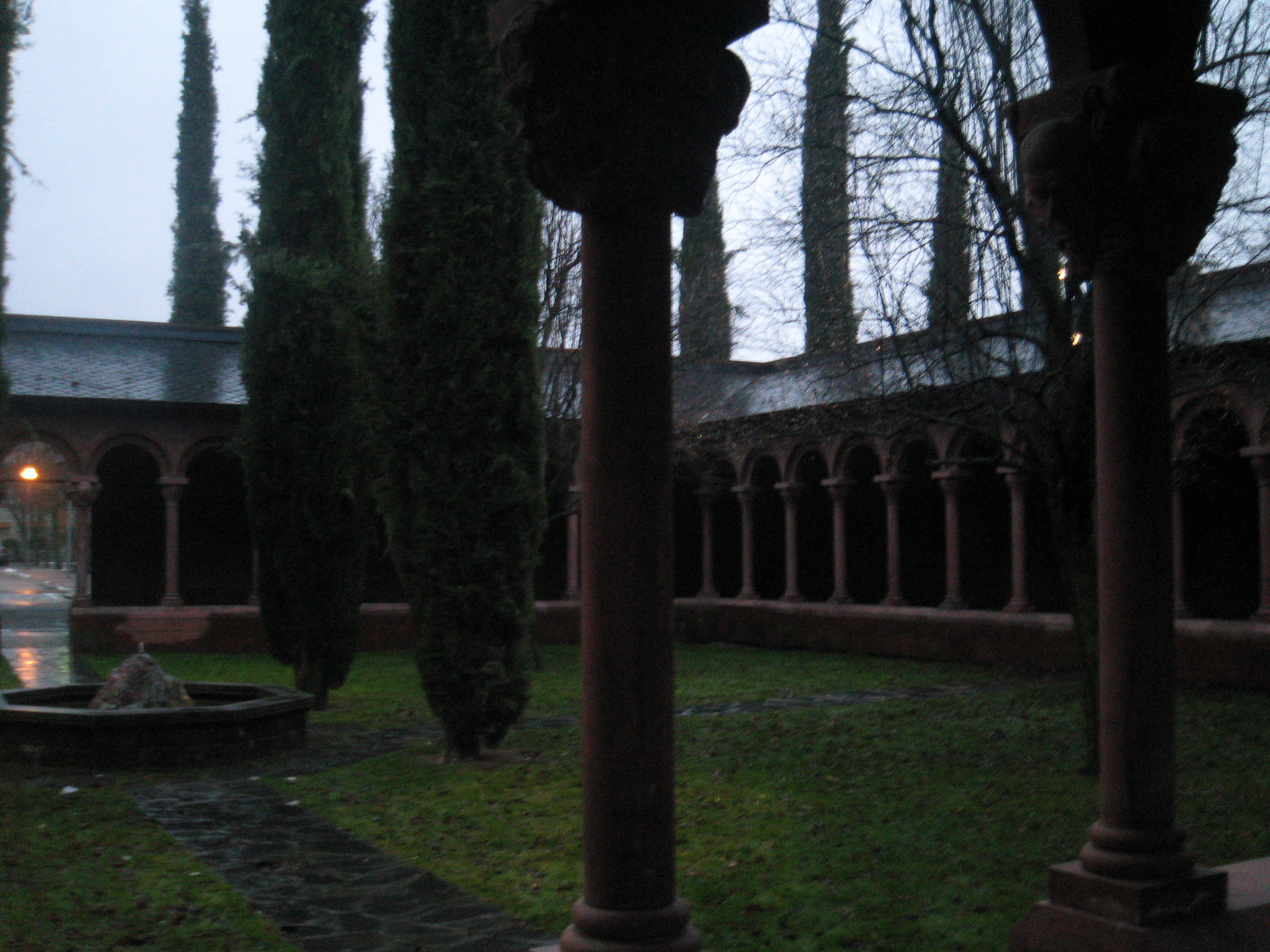 Fotografia dels claustres moderns del parc de la Valira, a la Seu d'Urgell.